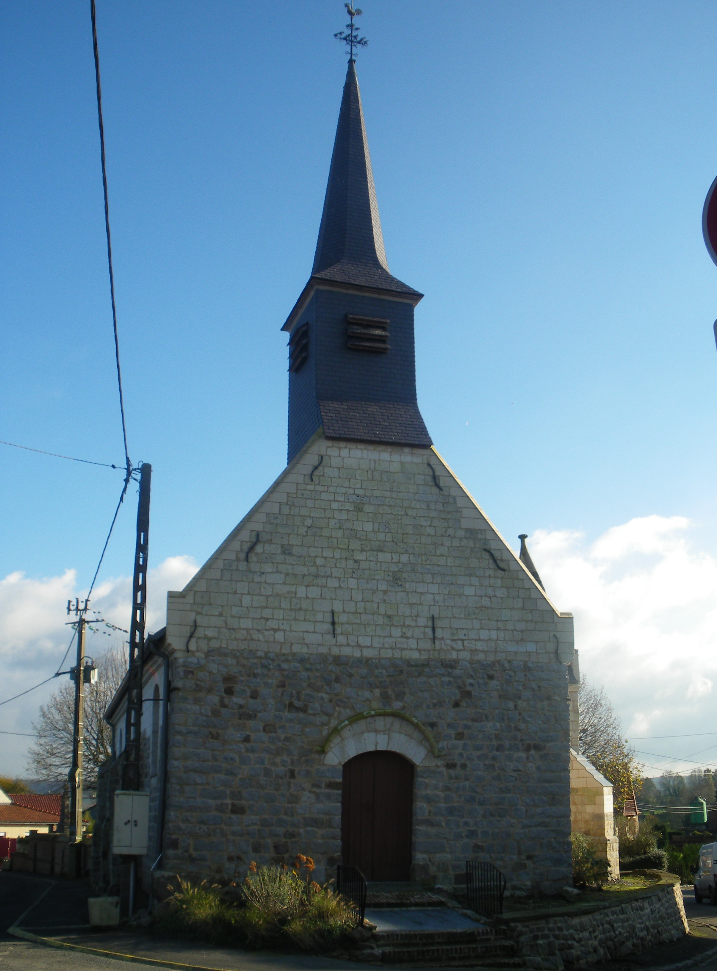 Vue de l'église d'Hermin.